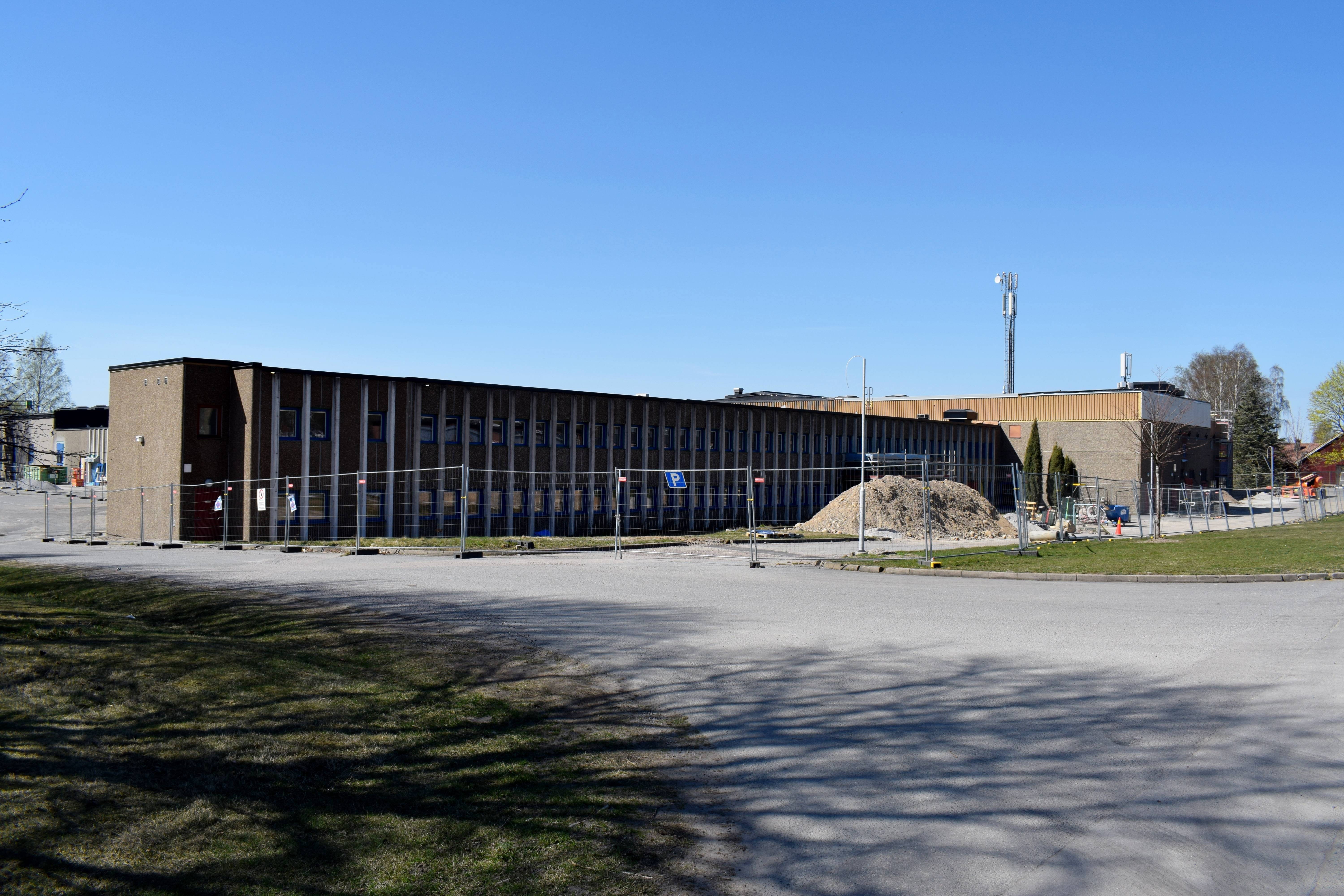 Före detta flygverkstad vid Bråvalla flygplats